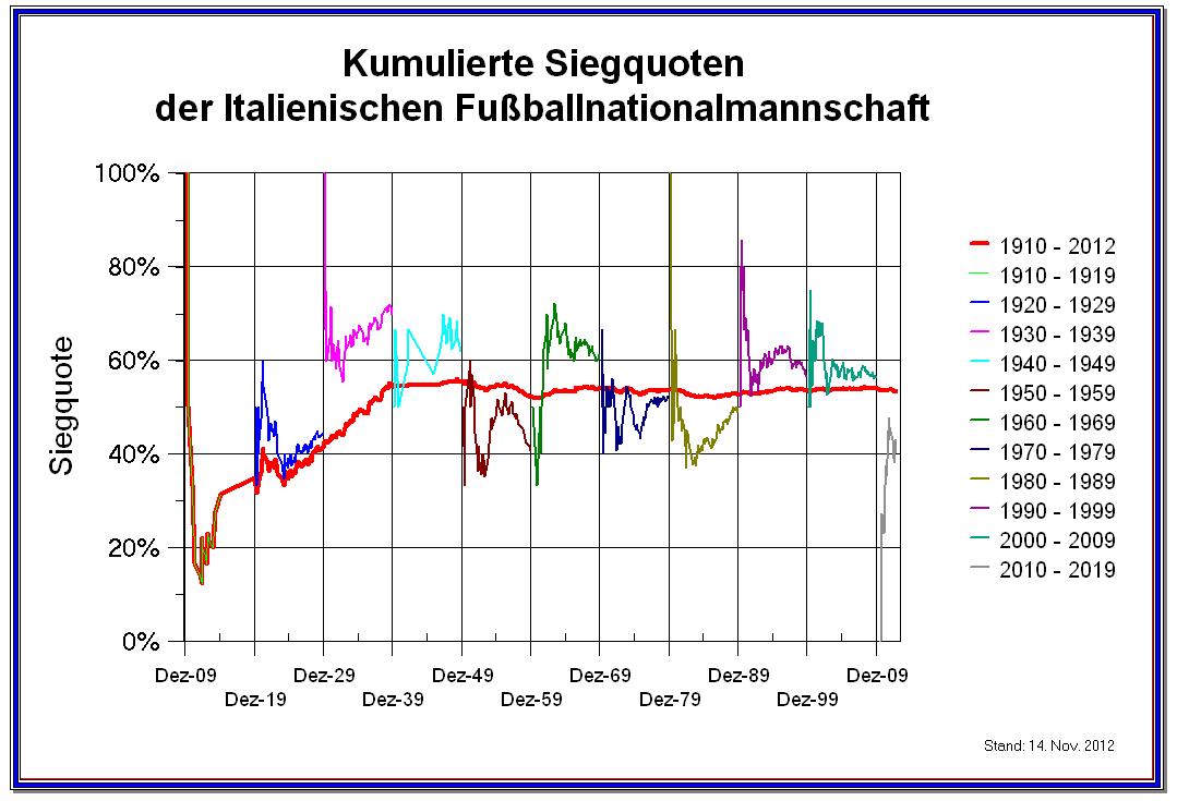 Kumulierte Siegquote der Italienischen Nationalmannschaft